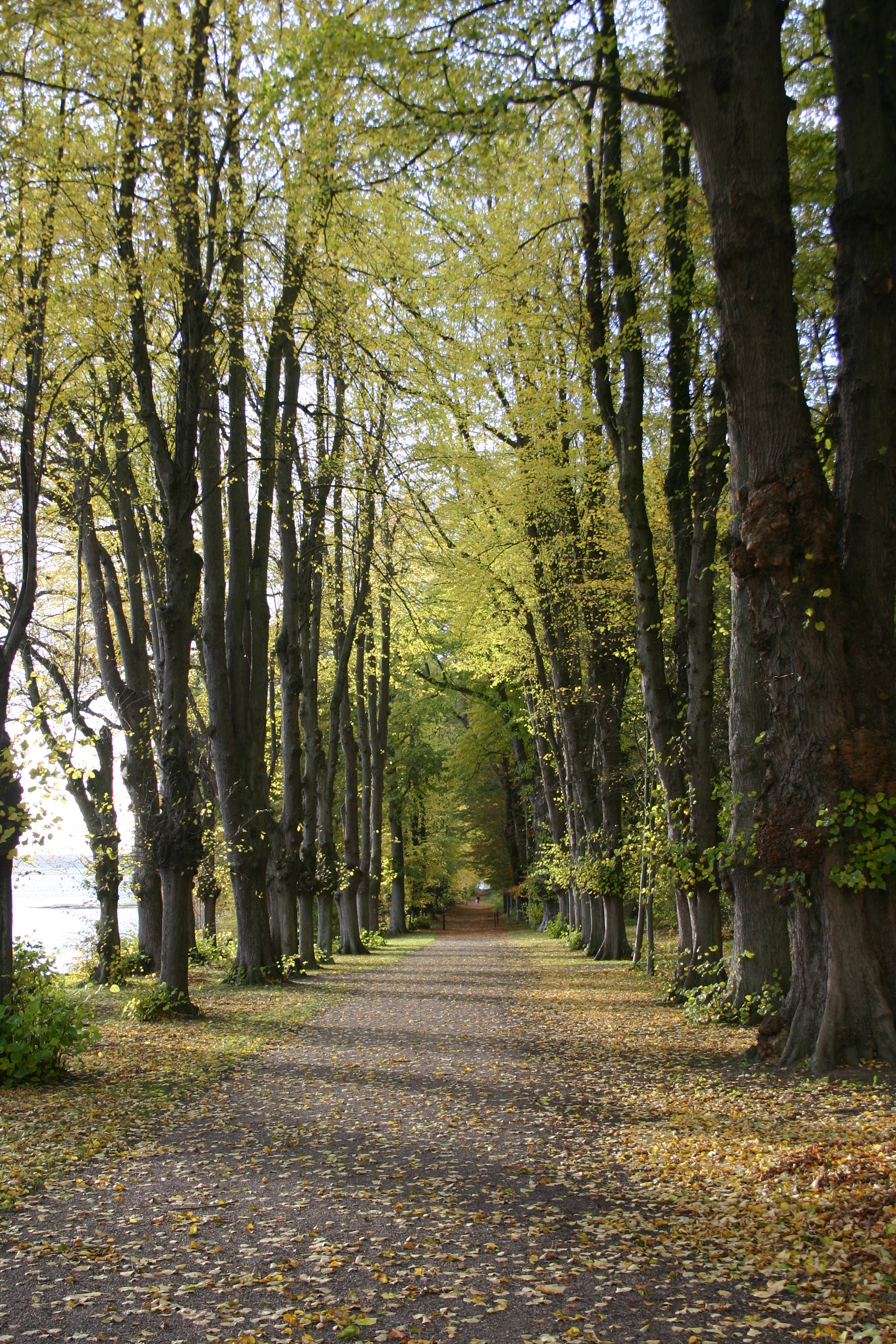 En af tre lindealléer, som forbinder slotsparken med skoven.